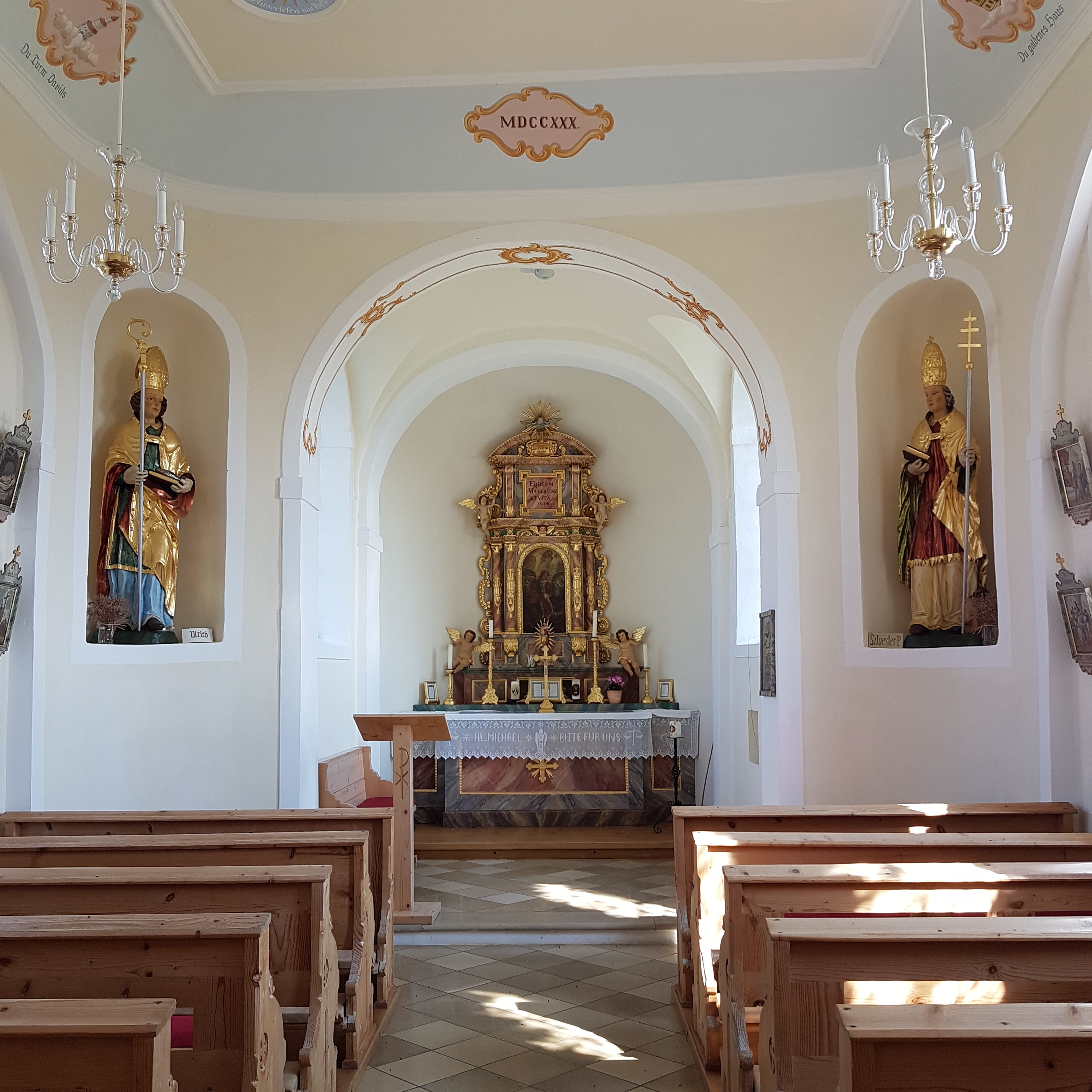 St. Michael (Kienberg), Innenraum mit Blick zum Chor.